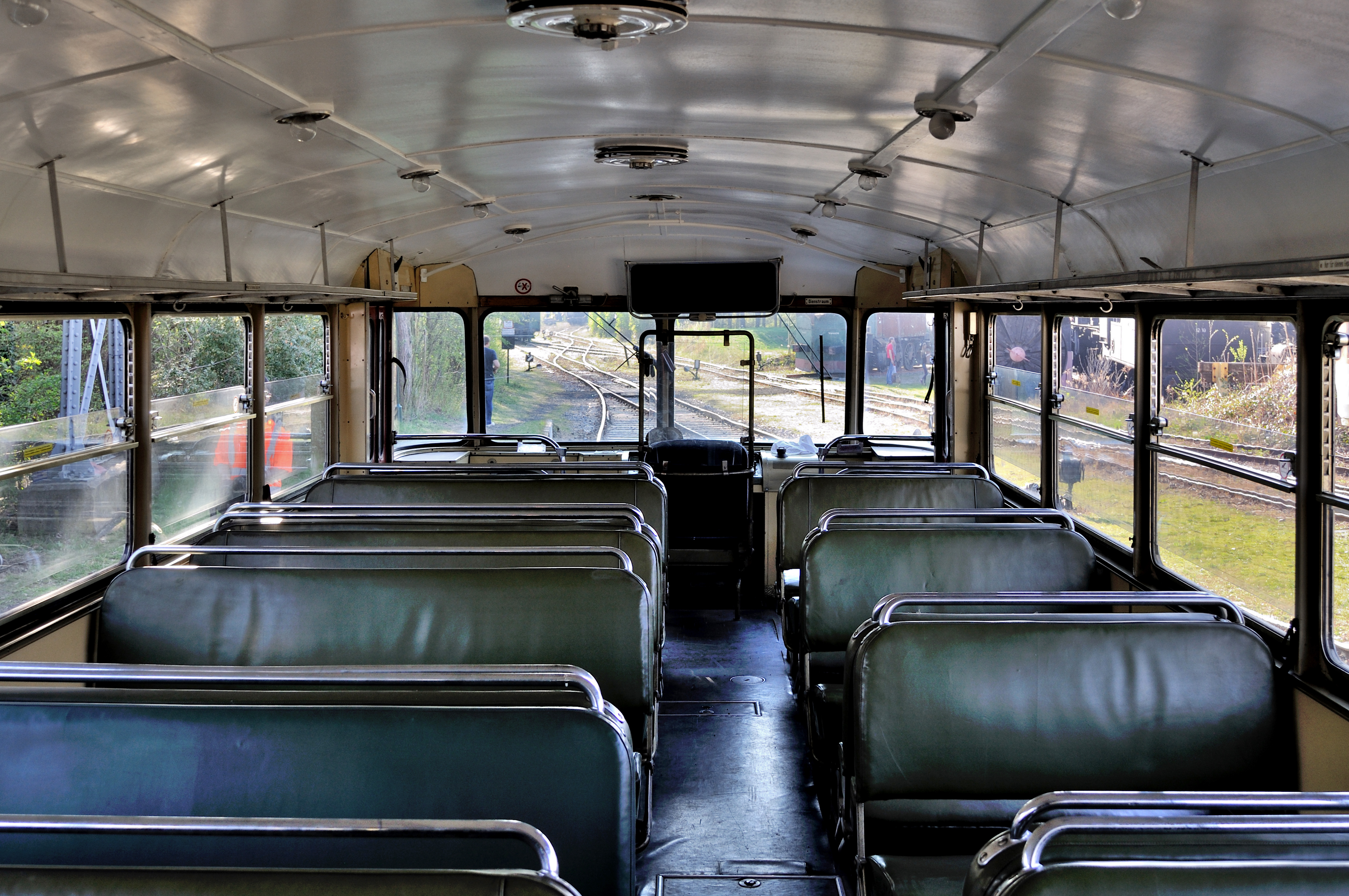 Innenansicht des Schienenbusses 8081.15 (5081.015)